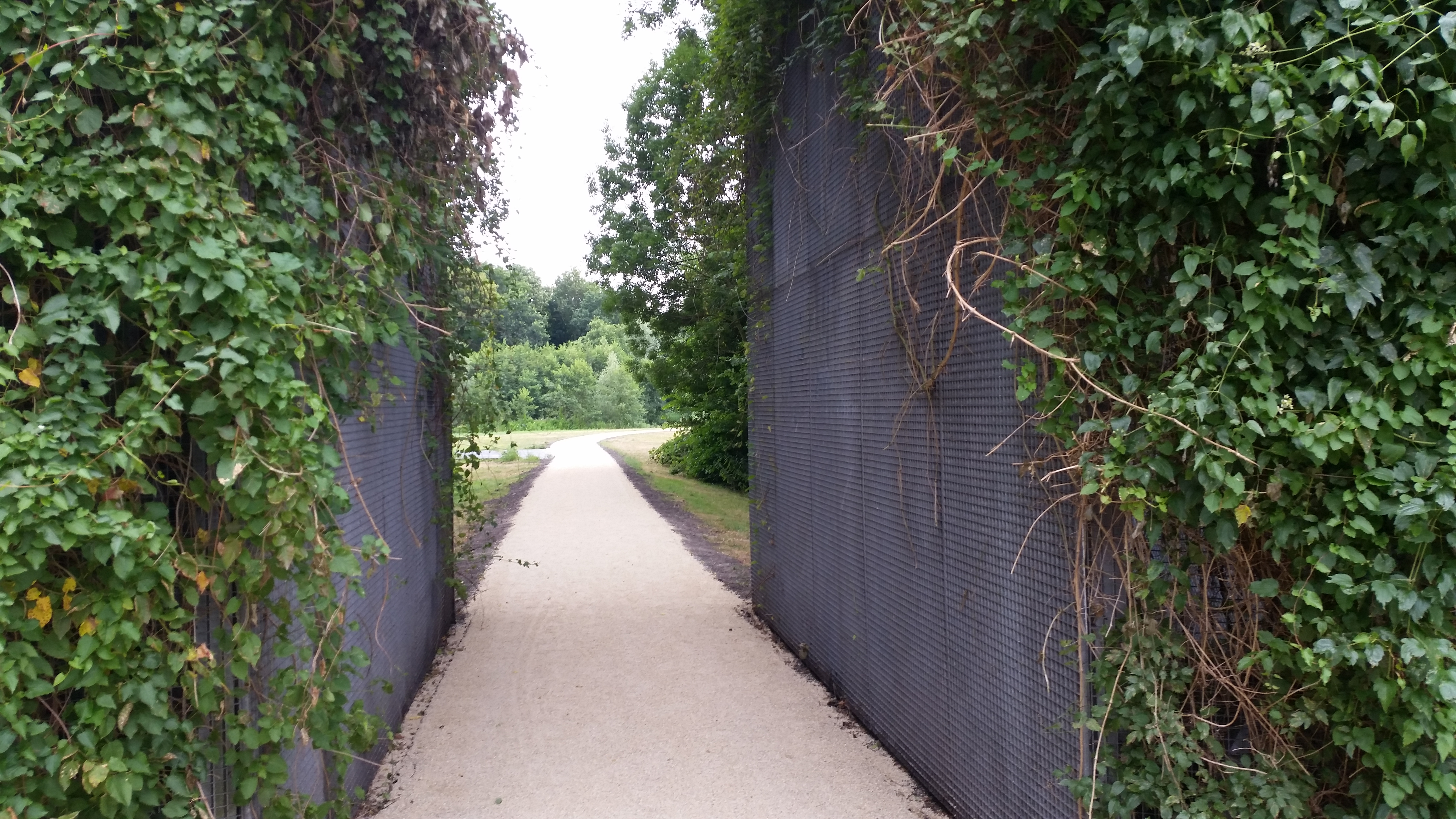 De poort van Brug 1828 (in Amsterdam)